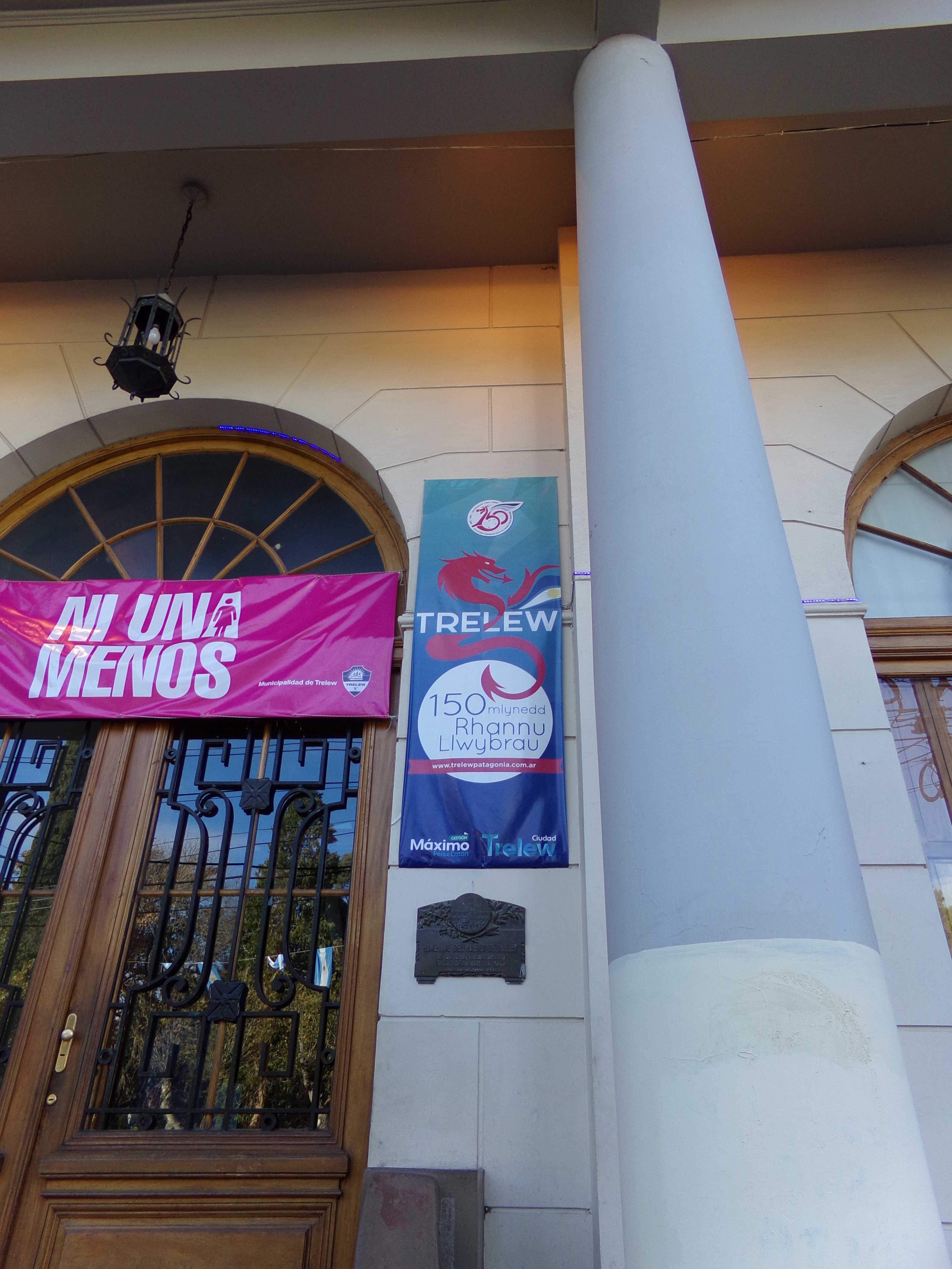 Cartel en galés en la Municipalidad de Trelew, Argentina, por los 150 años de la colonia galesa